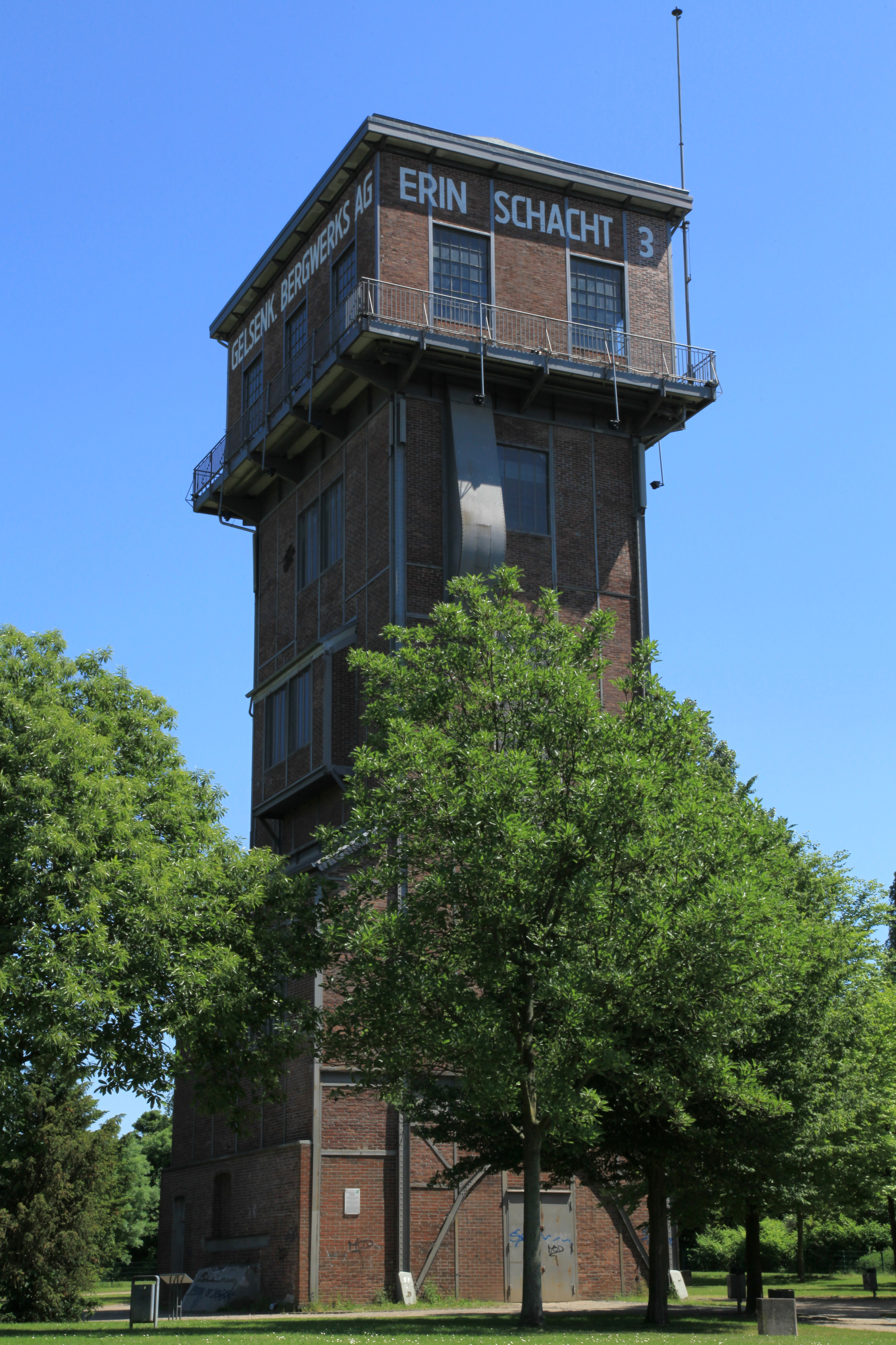 Zeche Erin Schacht 3 an der Bodelschwingher Straße in Castrop-Rauxel